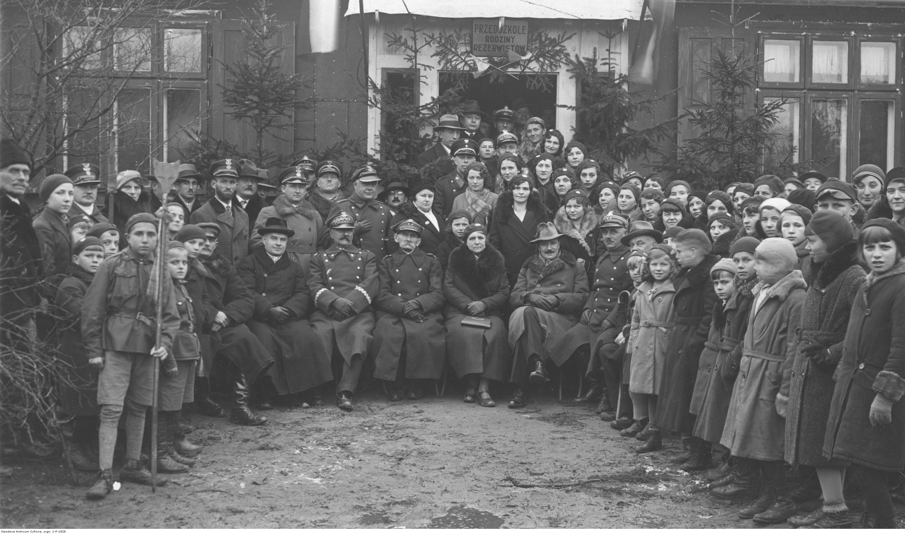 Poświęcenie świetlicy i przedszkola Związku Rezerwistów RP w osadzie Irena k. Dęblina; 1933. Grupa uczestników uroczystości. Widoczni m.in. ks. Pogonowski, gen. Bolesław Frej, weteran powstania styczniowego Aleksander Uchnast, M. Sokólska, starosta puławski Mieczysław Lutman, dowódca 15 pp ppłk Władysław Wojakowski, dyrektor gimnazjum Bolesław Piwoński (prawdopodobnie siedzą w tej kolejności od lewej do prawej w 1. rzędzie). Koncern Ilustrowany Kurier Codzienny - Archiwum Ilustracji. Sygnatura: 1-P-1828